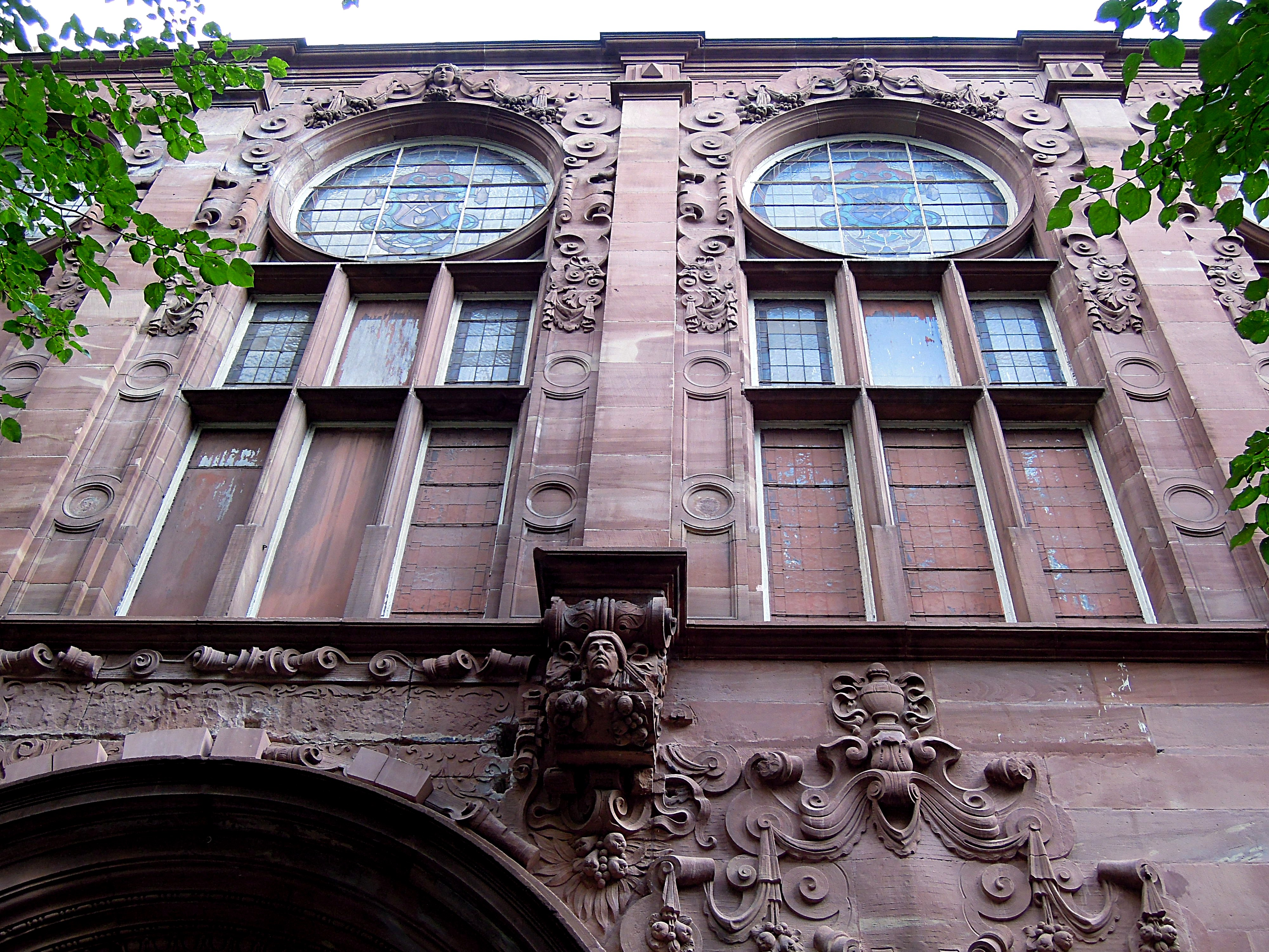 Détail de façade, rue Gambetta.Les vitraux symbolisent les corporations. Bâtiment construit sous l'annexion allemande, de style architecture rhénane de la Renaissance. .